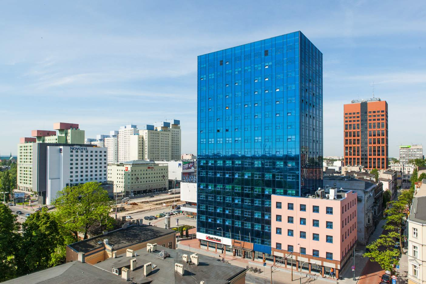 budynek biurowy w Łodzi Śródmieściu - Sienkiewicza 85/87